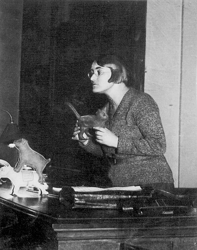 Lidia Zamenhof, St.-Etienne 1933. Während des Unterrichtens mit der Cseh-Methode.